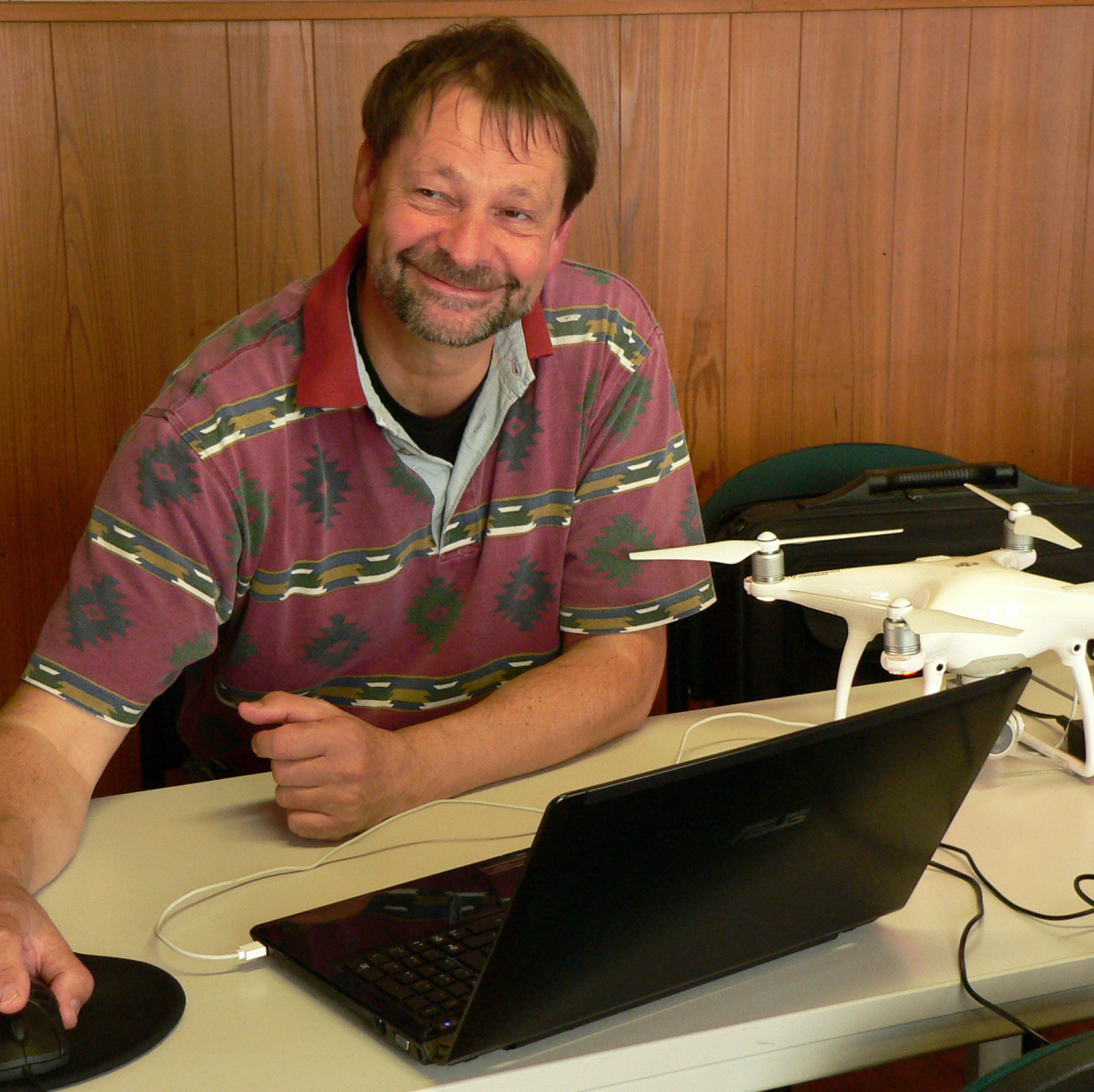 Peter Steppuhn auf der Ausgrabung der Glashütte Klein Süntel, Auswertung eines Quadrocopterfluges mit Luftbildern von der Grabungssstelle